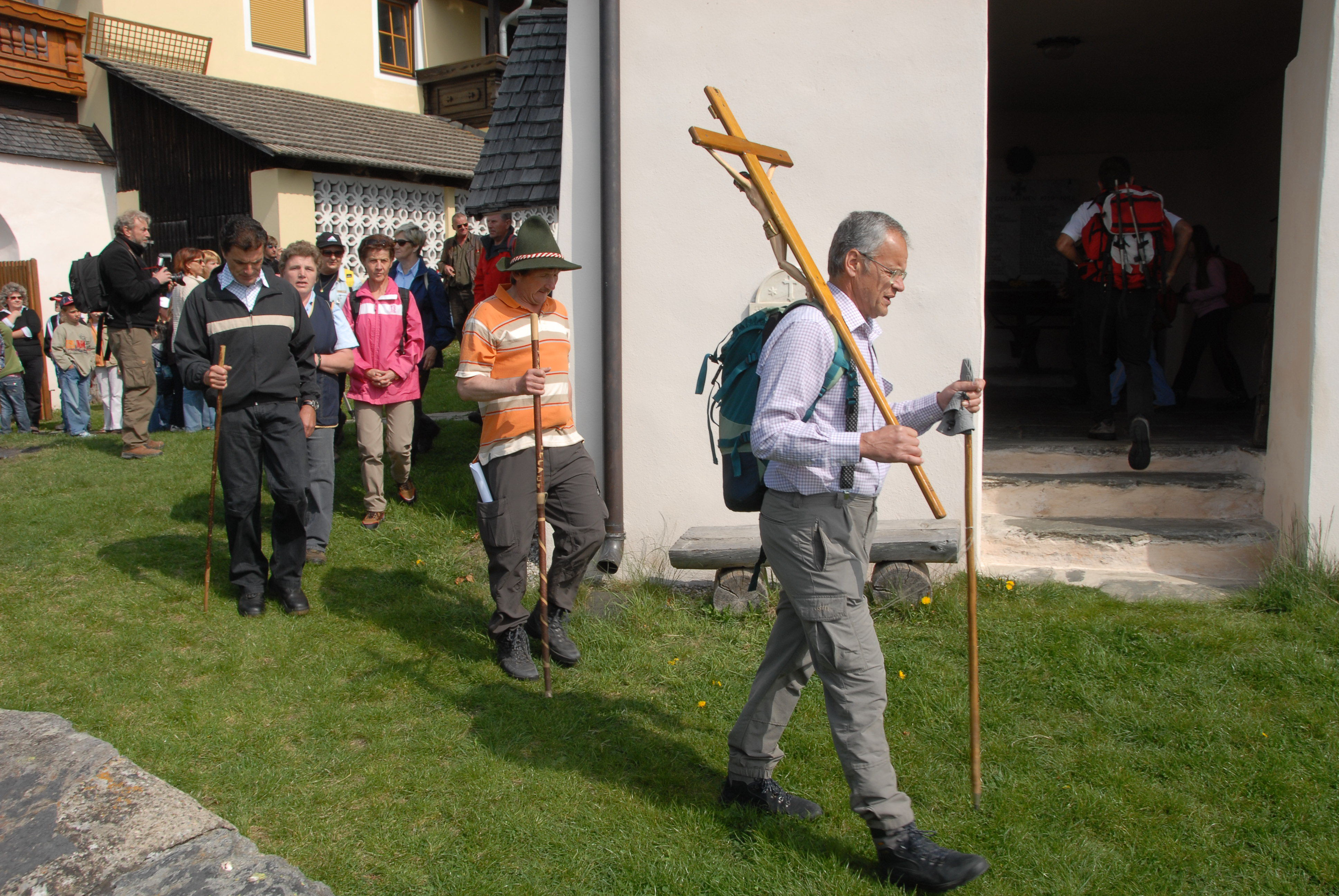 Vierbergelauf pilgrimage starts at Soerg, heading for Magdalensberg, Carinthia, Austria.